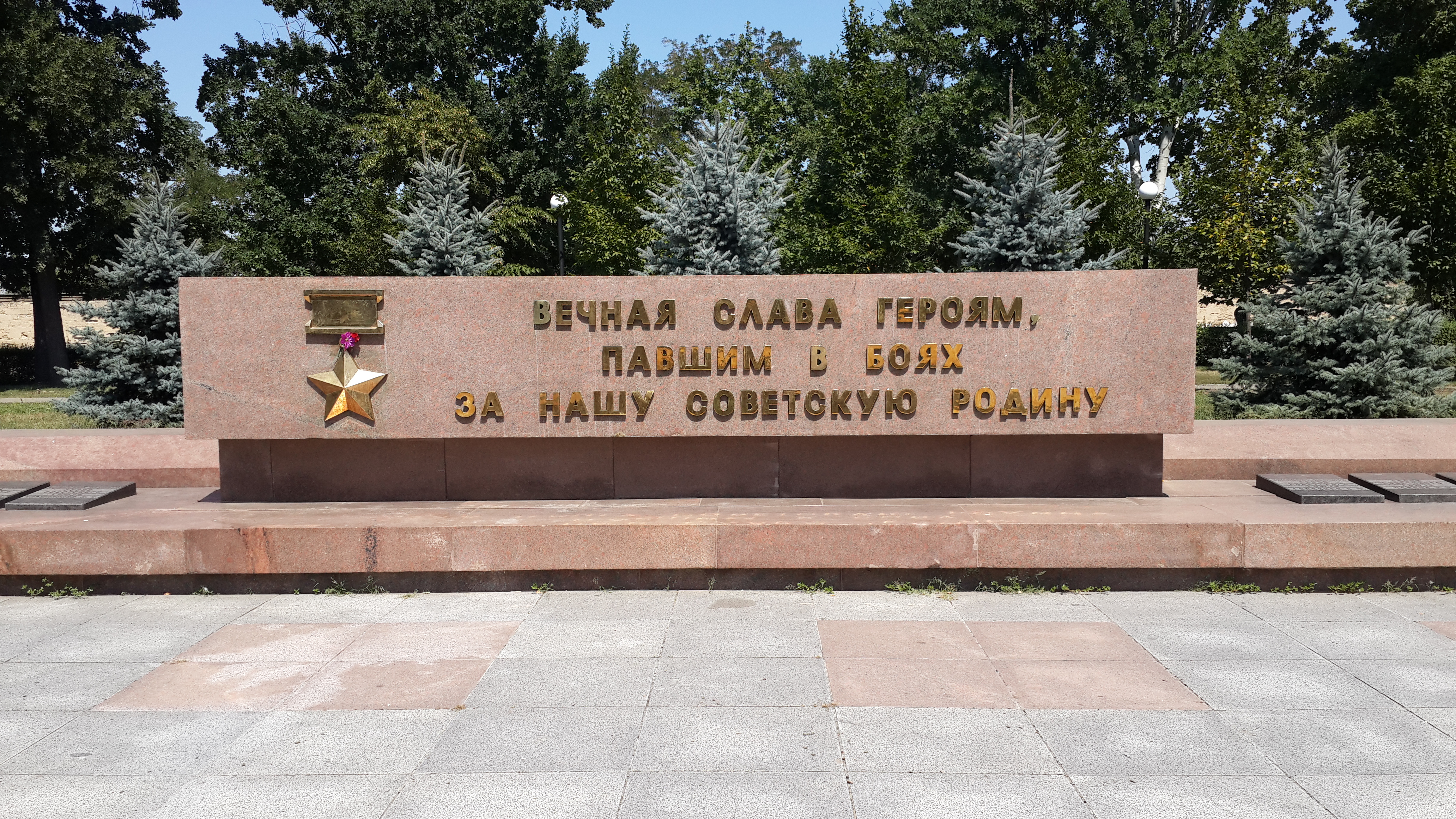 Меморіальний комплекс на честь 68-ми десантників-ольшанців (дві одиниці обліку: 1. Братська могила 2. Пам'ятник) (Автори: скульптор Ю.П. Поммер, архітектори В.П. Душкін, В.П. Попов, О.П. Попова), Миколаїв, перетин вул. Адміральської та вул. Радянської (сквер десантників)